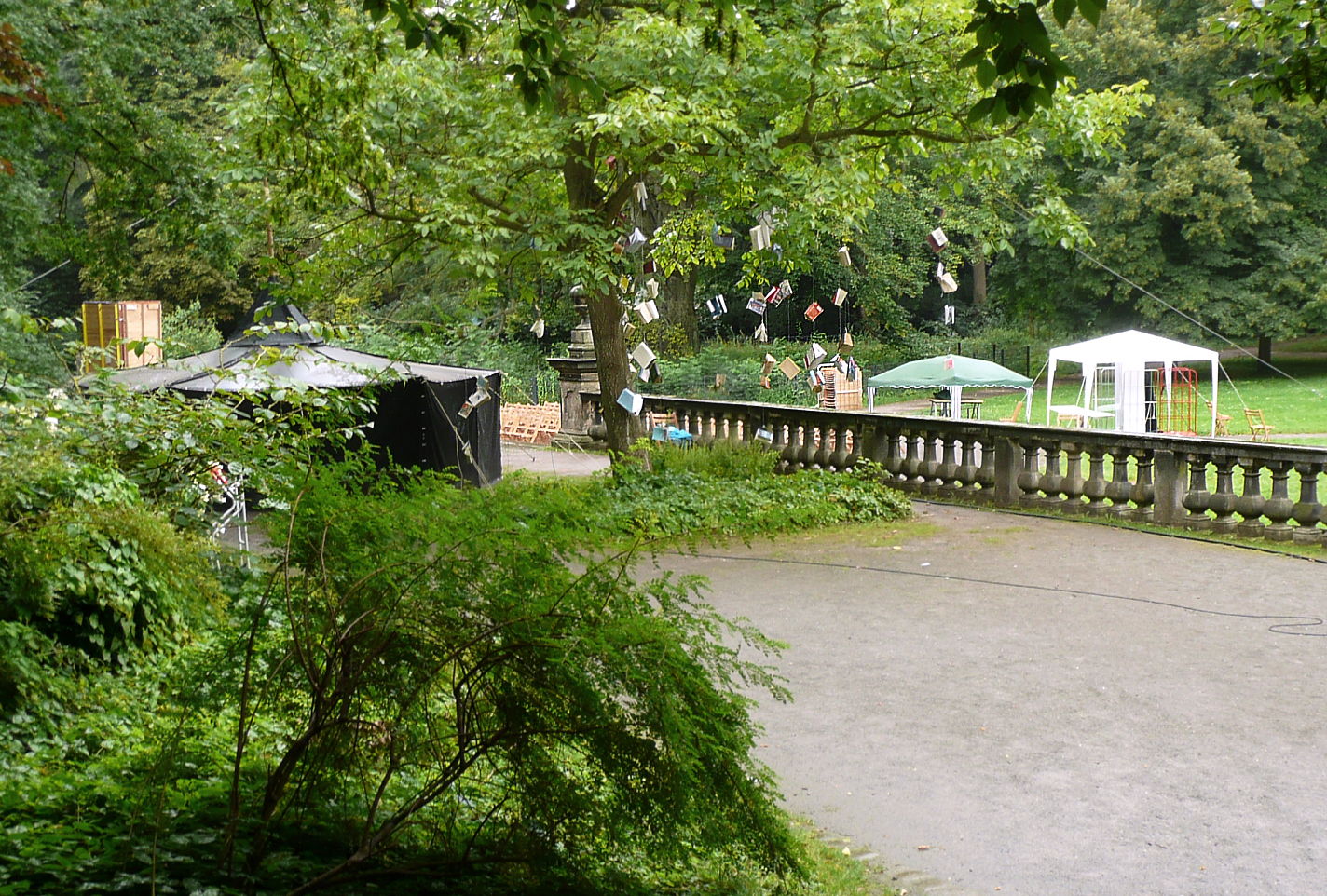 Blick zur Bühne des moa theaters im von Alten Garten